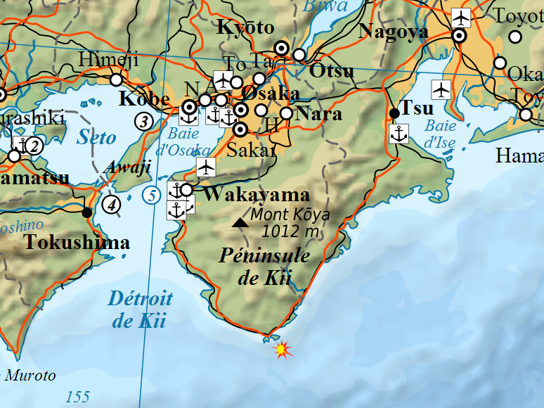 Ertuğrul fırkateyninin Japonya'dan İstanbul'a dönerken kayalıklara çarptığı ve battığı konum.